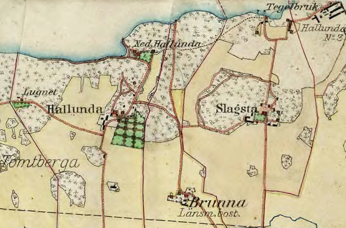 Gårdarna Hallunda och Slagsta